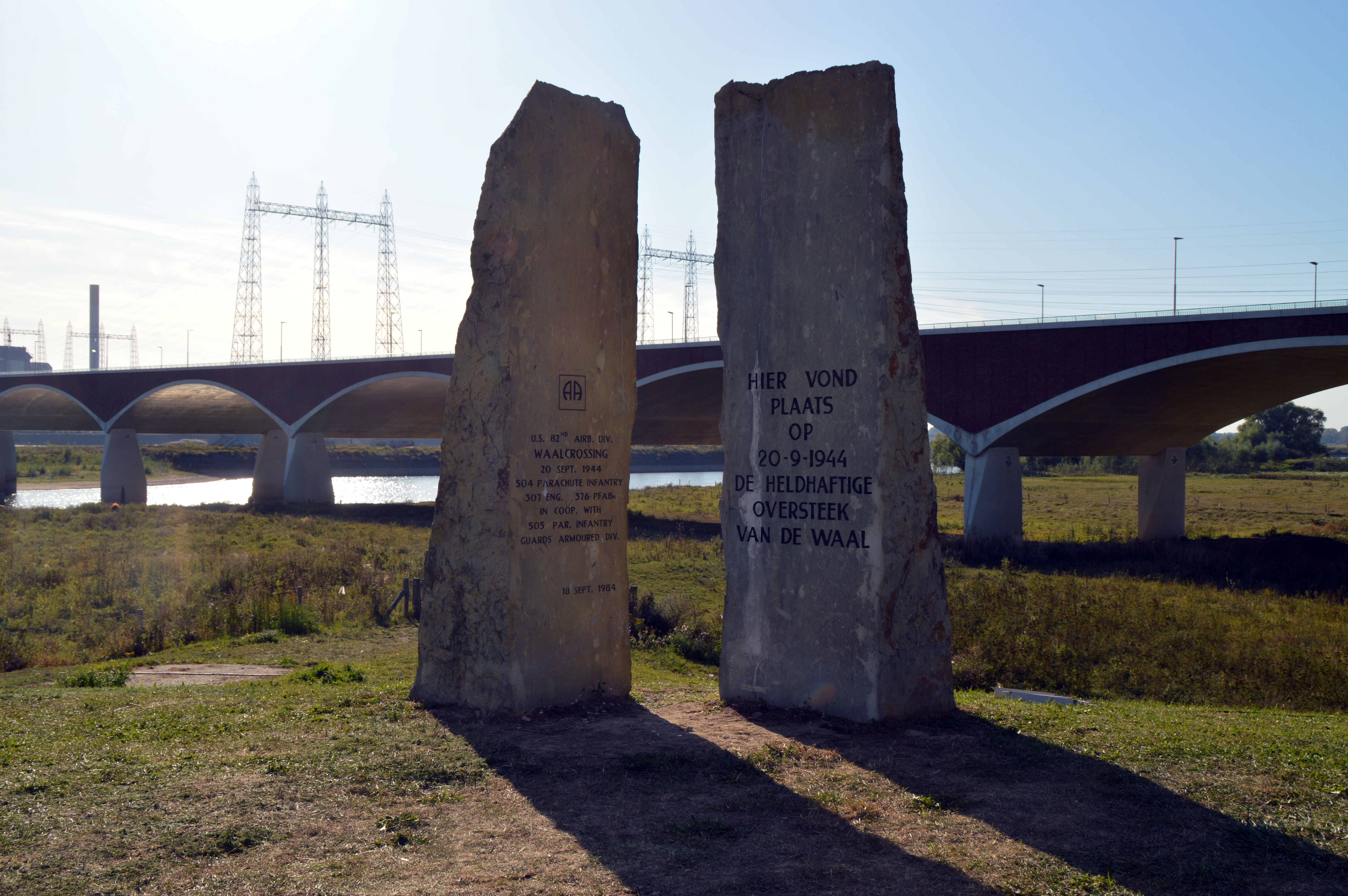 Waaloversteek Waalcrossing monument. Nijmegen Netherlands 82nd Airborne Division